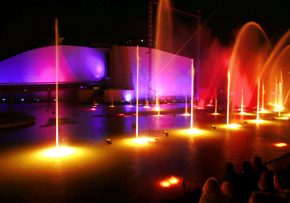 Magic Moments Wasser- Lichtshow